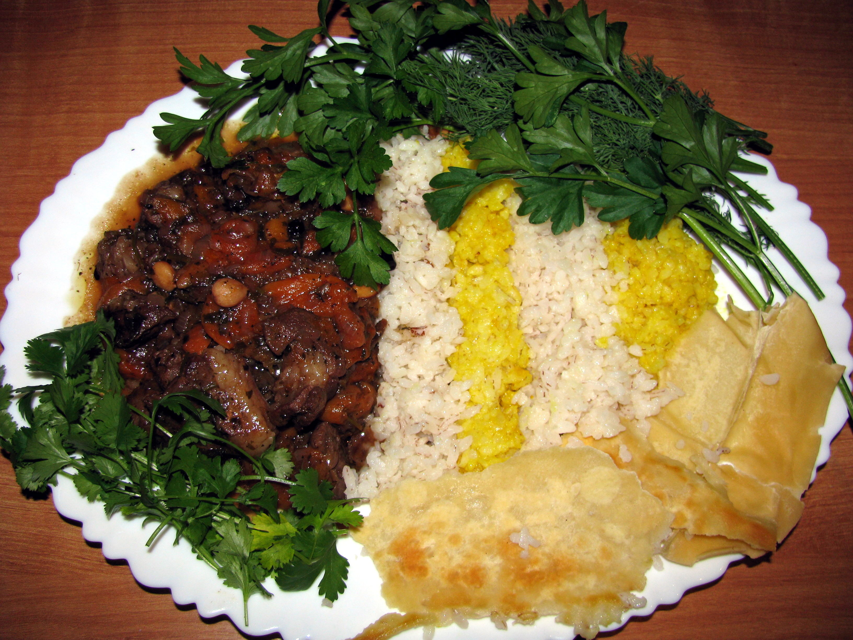 Азербайджанский плов из подкрашенного куркумой риса с гарниром из баранины, кураги, слив и ядер абрикосов. Добавлены казмаг и зелень.